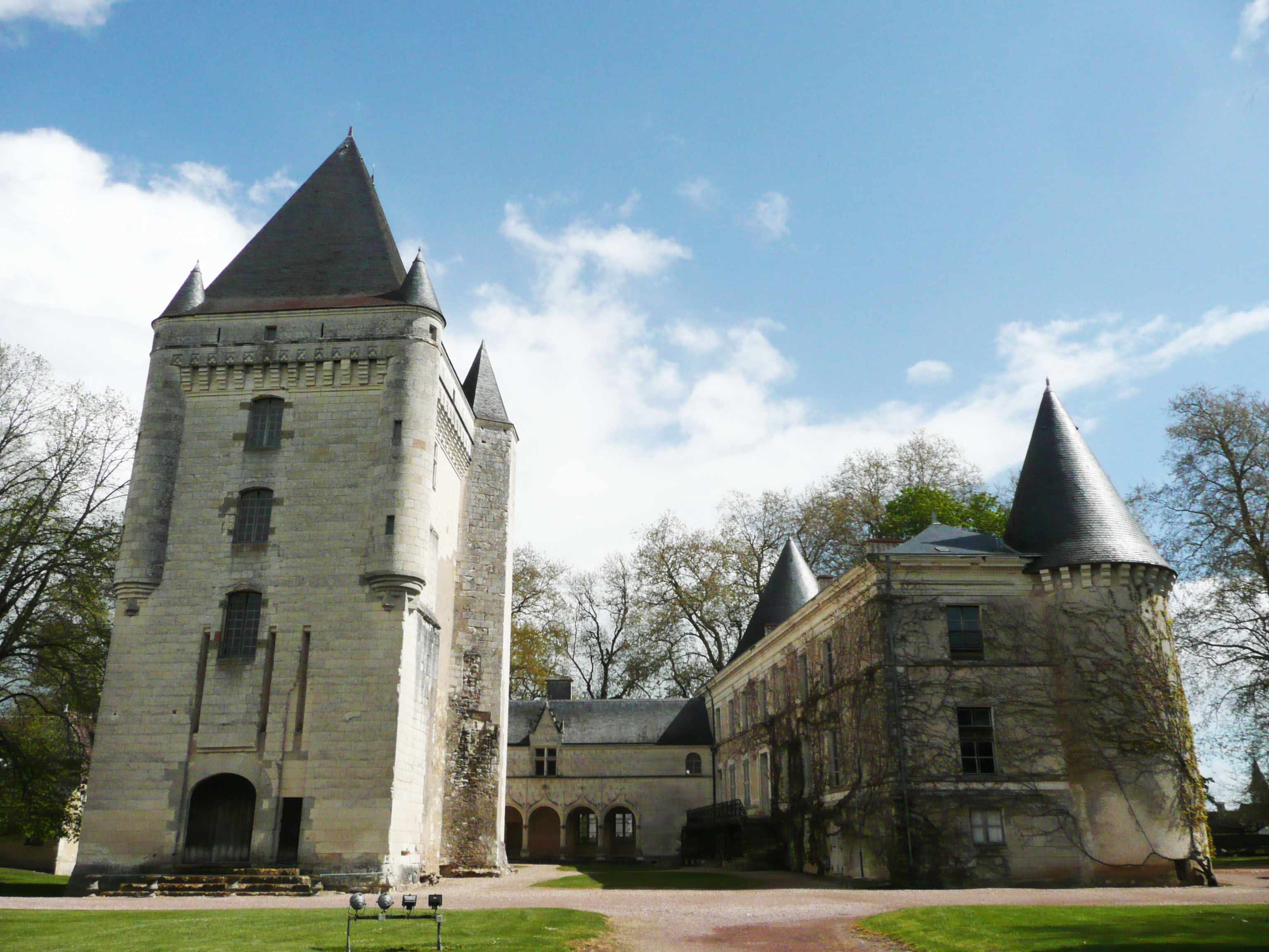 Propriété du Club du Vieux Manoir et plateforme centrale de ses formations et camps chantiers